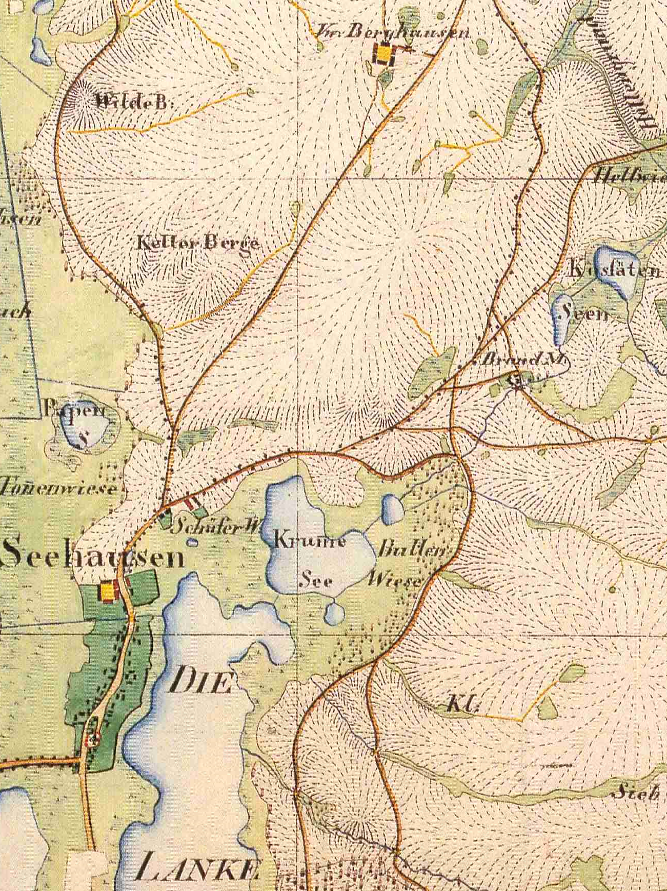 Seehausen mit den Wohnplätzen Berghausen und Brandmühle Gemeinde Oberuckersee, Lkr. Uckermark, Brandenburg, Ausschnitt aus dem Urmesstischblatt 2749 Potzlow von 1827